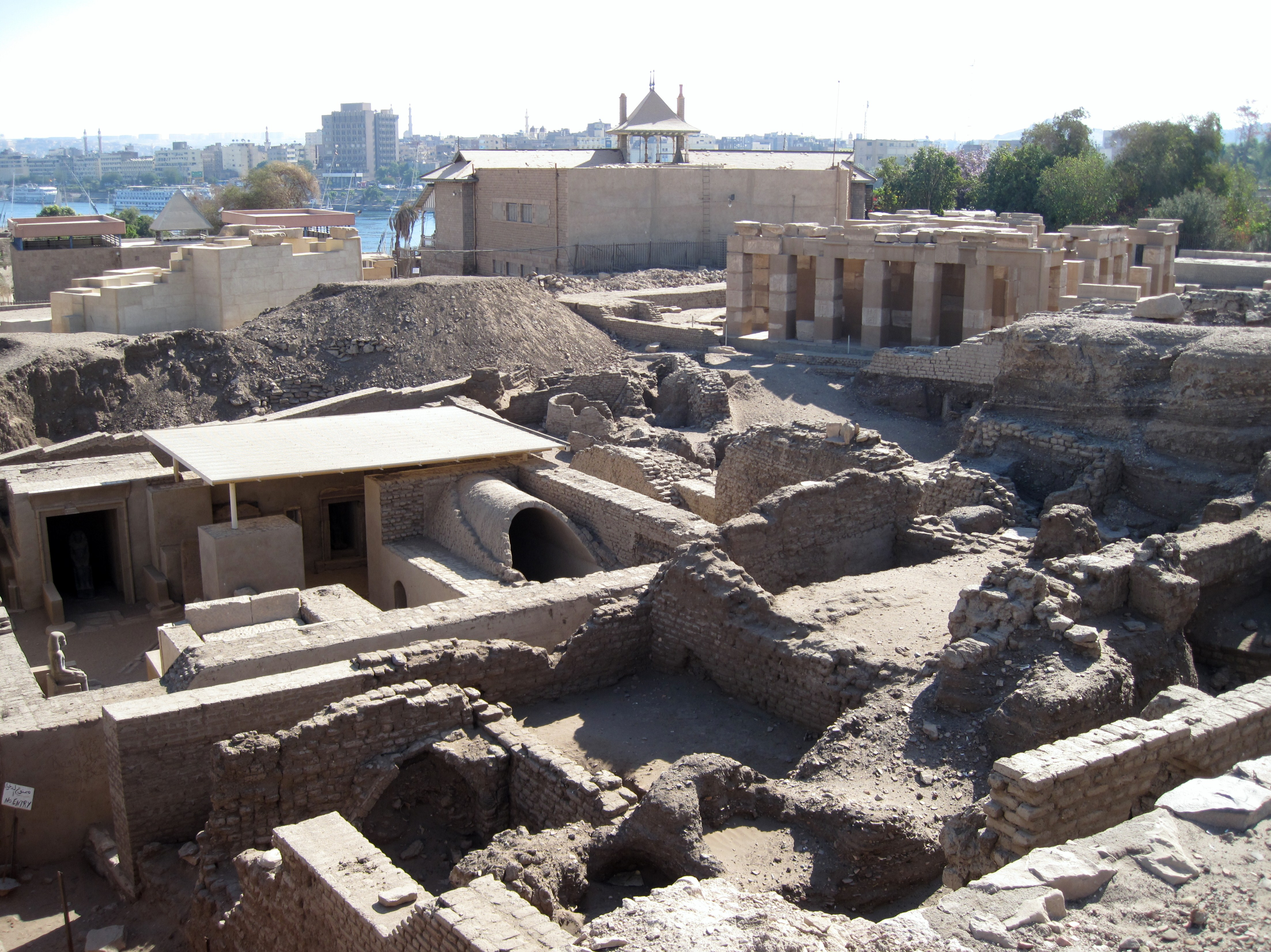 Ausgrabungsstätte auf der Insel Elephantine in Assuan, Ägypten